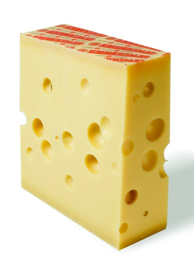 Schweizer Emmentaler AOC, Block